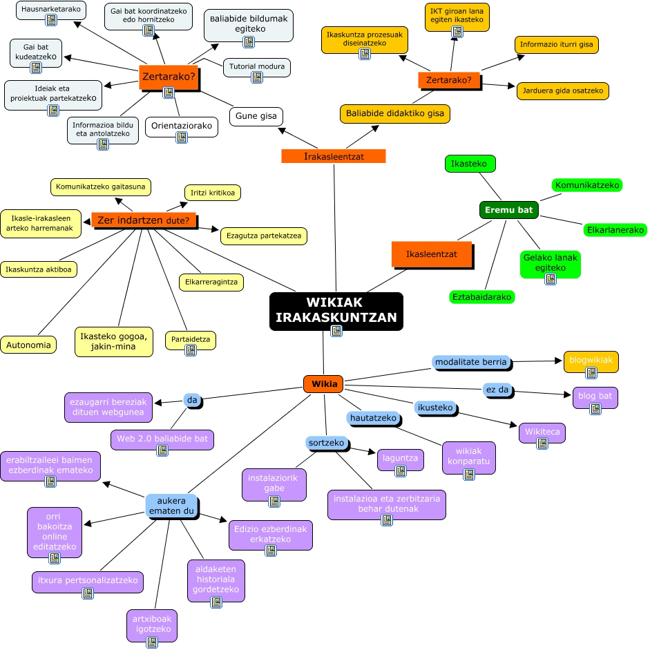 Wikiak irakaskuntzan. Mapa kontzeptuala.